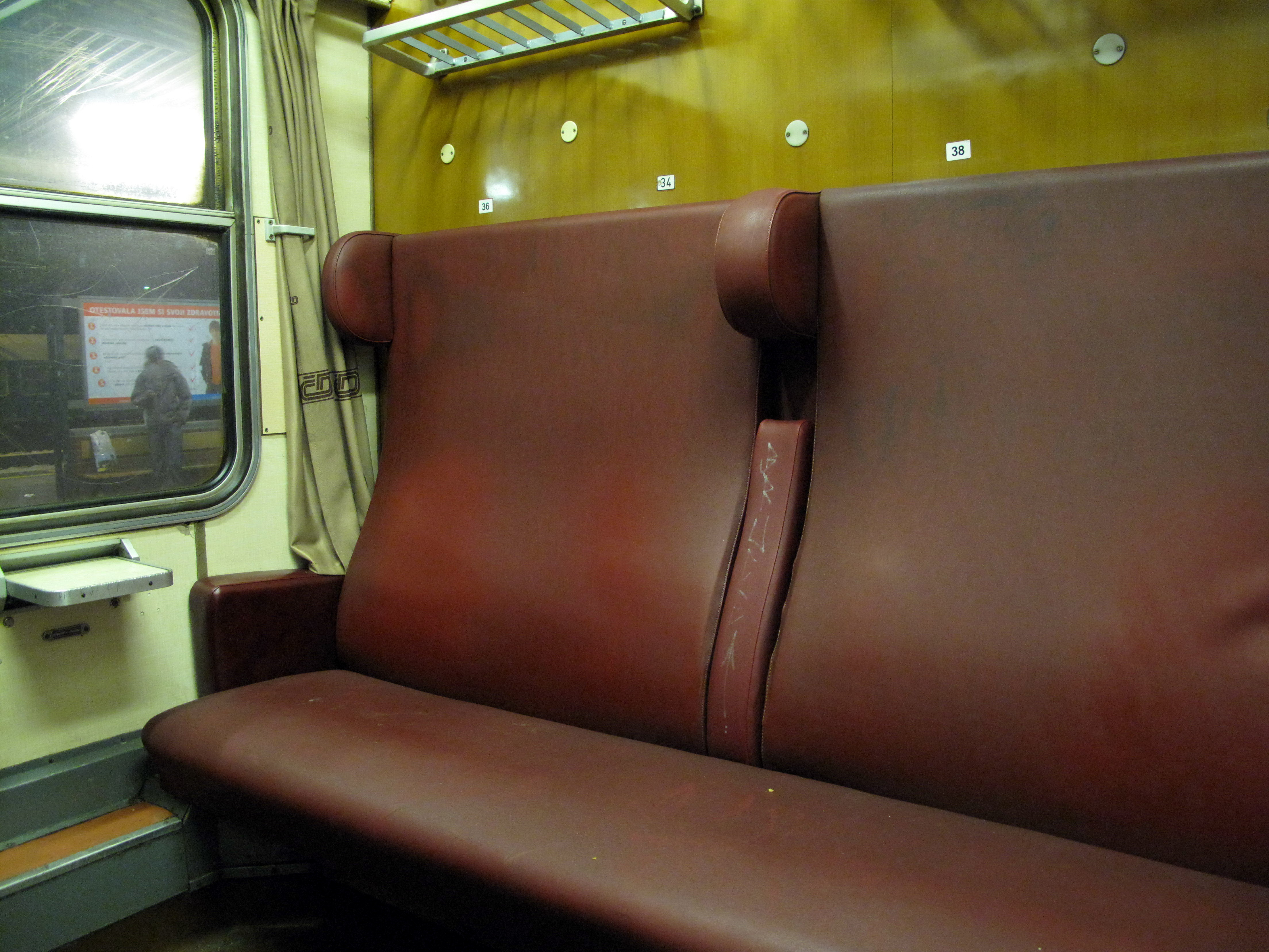 Kupé v rychlíku